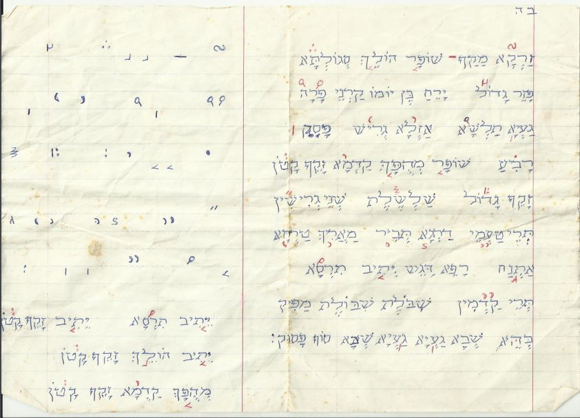 לוח ללימוד טעמי המקרא